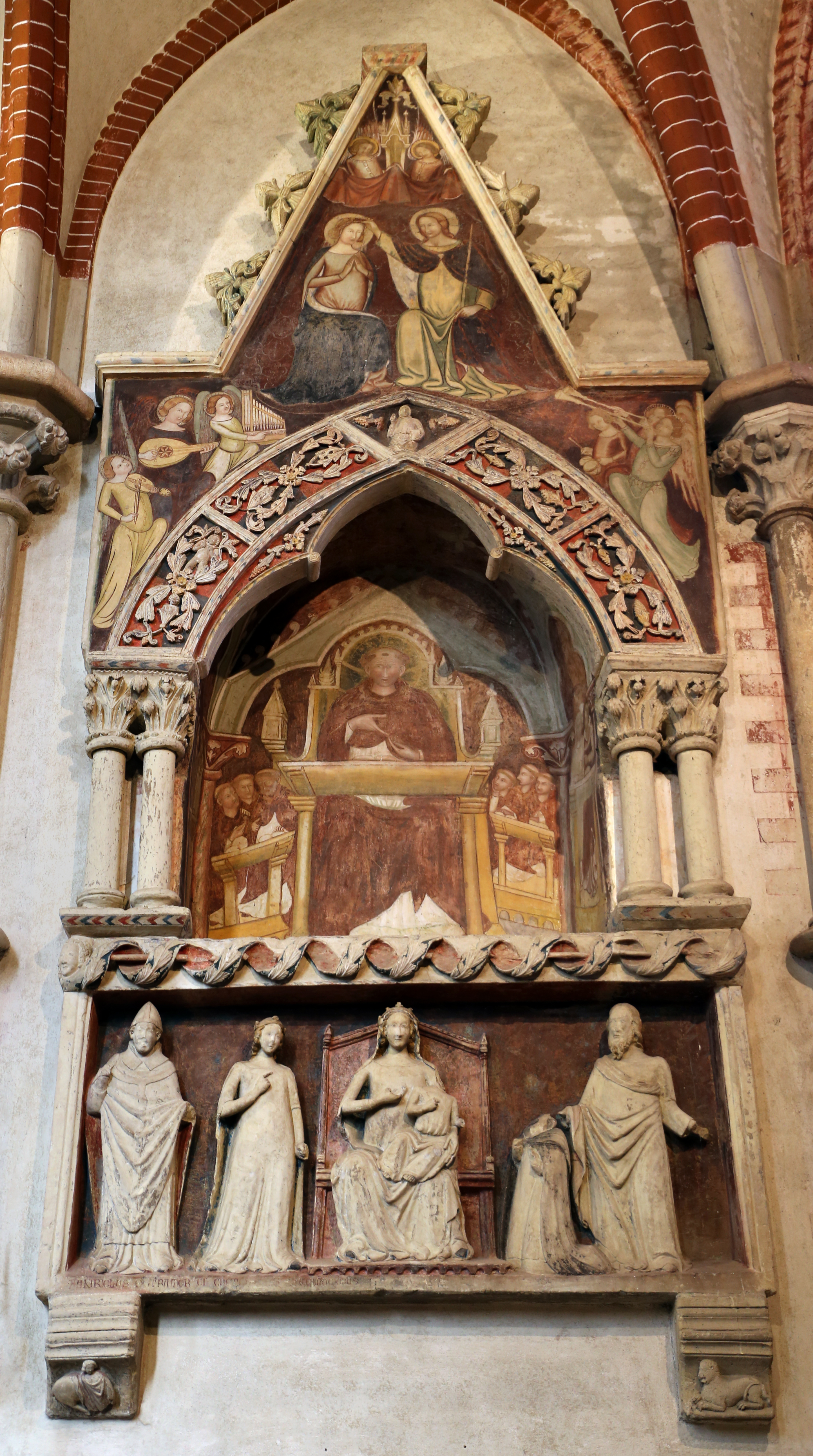 basilica di Sant'Andrea This is a photo of a monument which is part of cultural heritage of Italy.